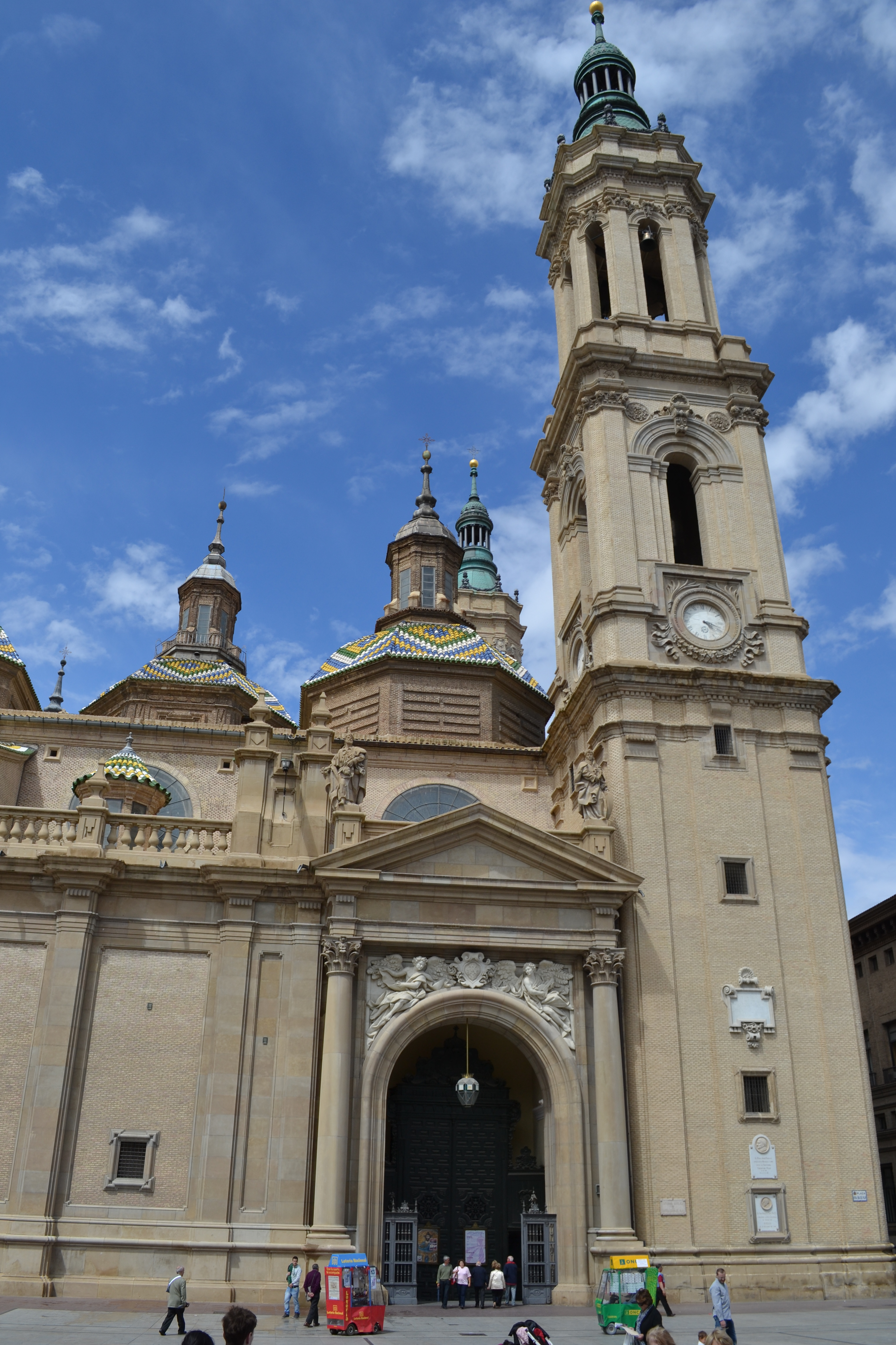 La Basílica de Nuestra Señora del Pilar es una iglesia católica situado en la ciudad española de Zaragoza